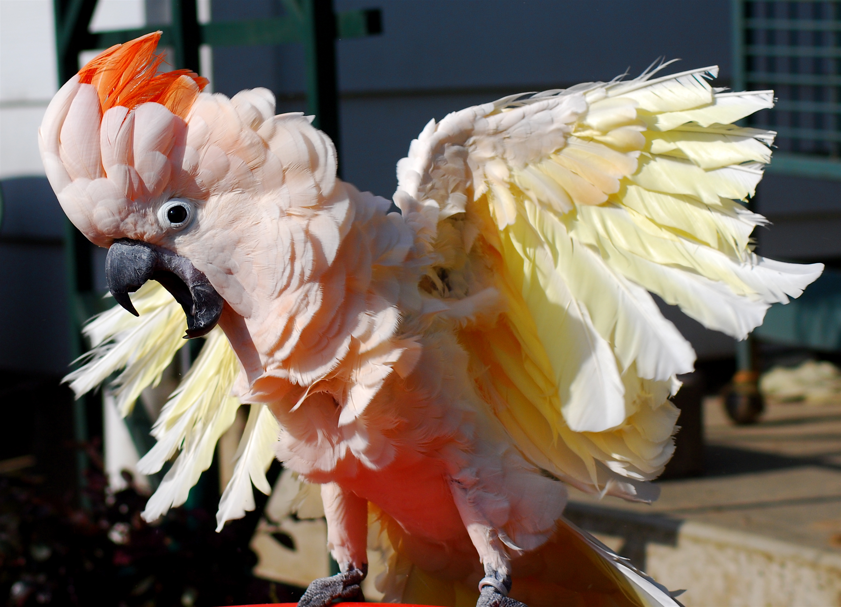 Moluccan Cockatoo